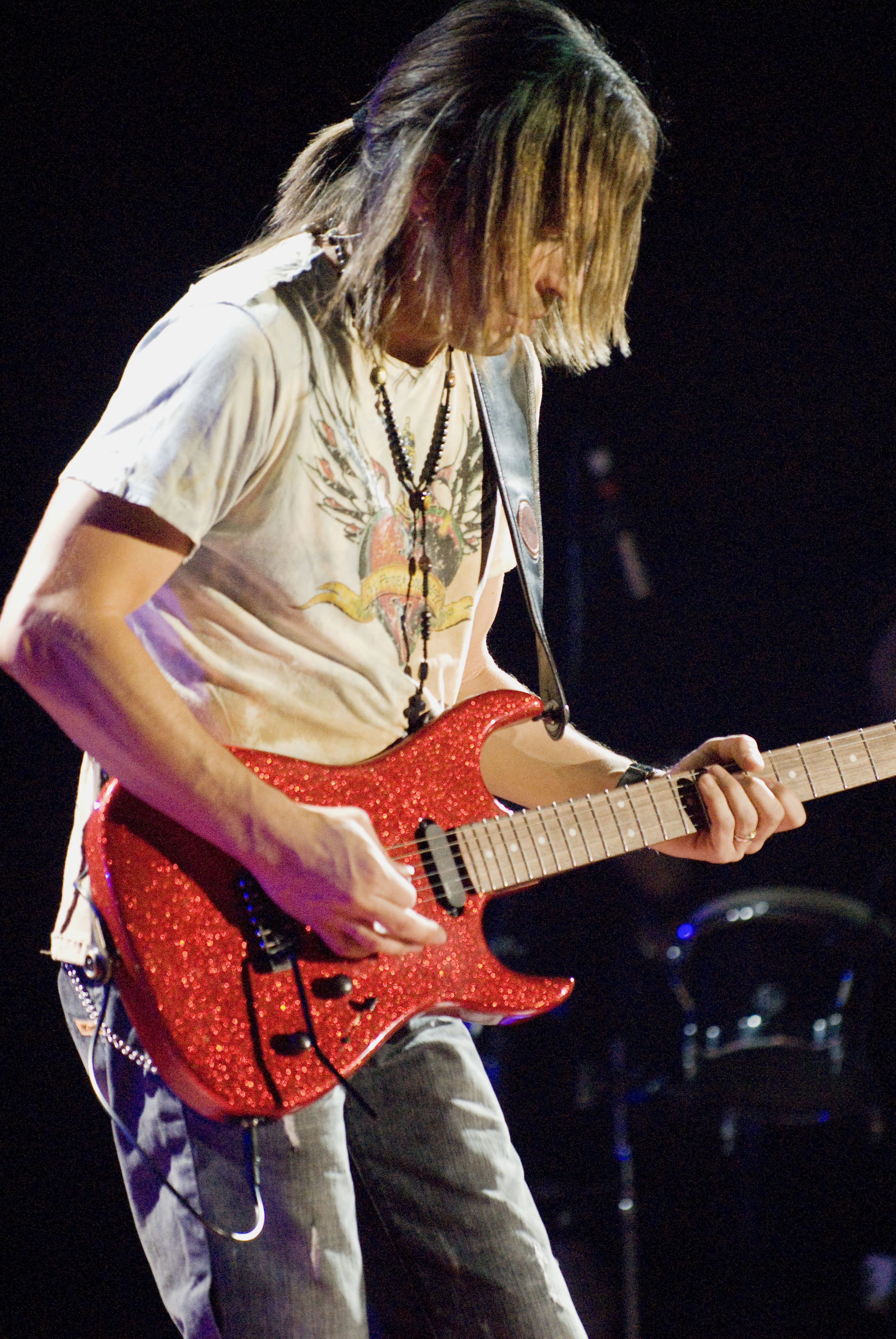 Maná